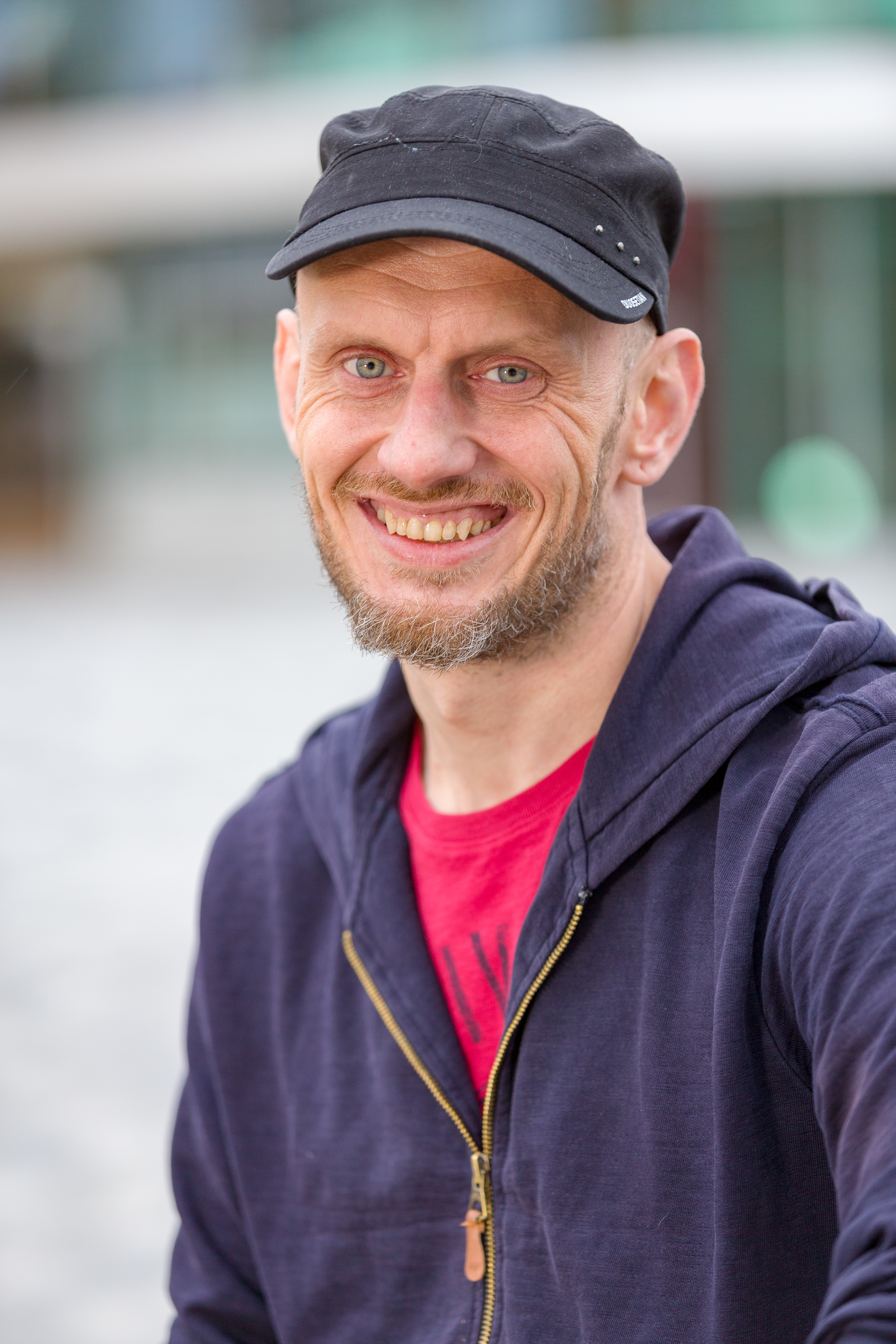 Kinderboekenauteur Pieter Koolwijk